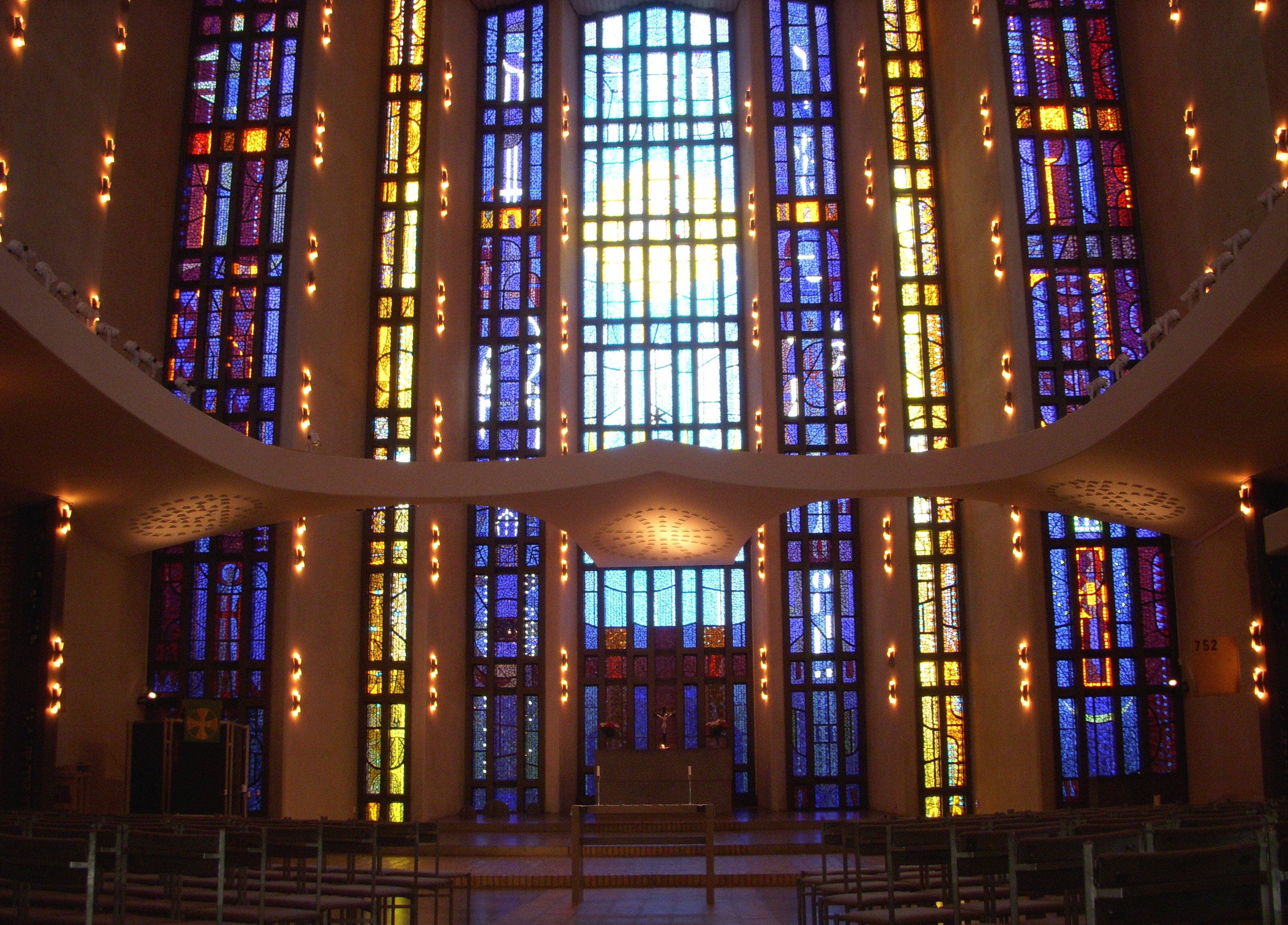 Uppenbarelsekyrkan i Hägersten, arkitekt Johannes Olivegren